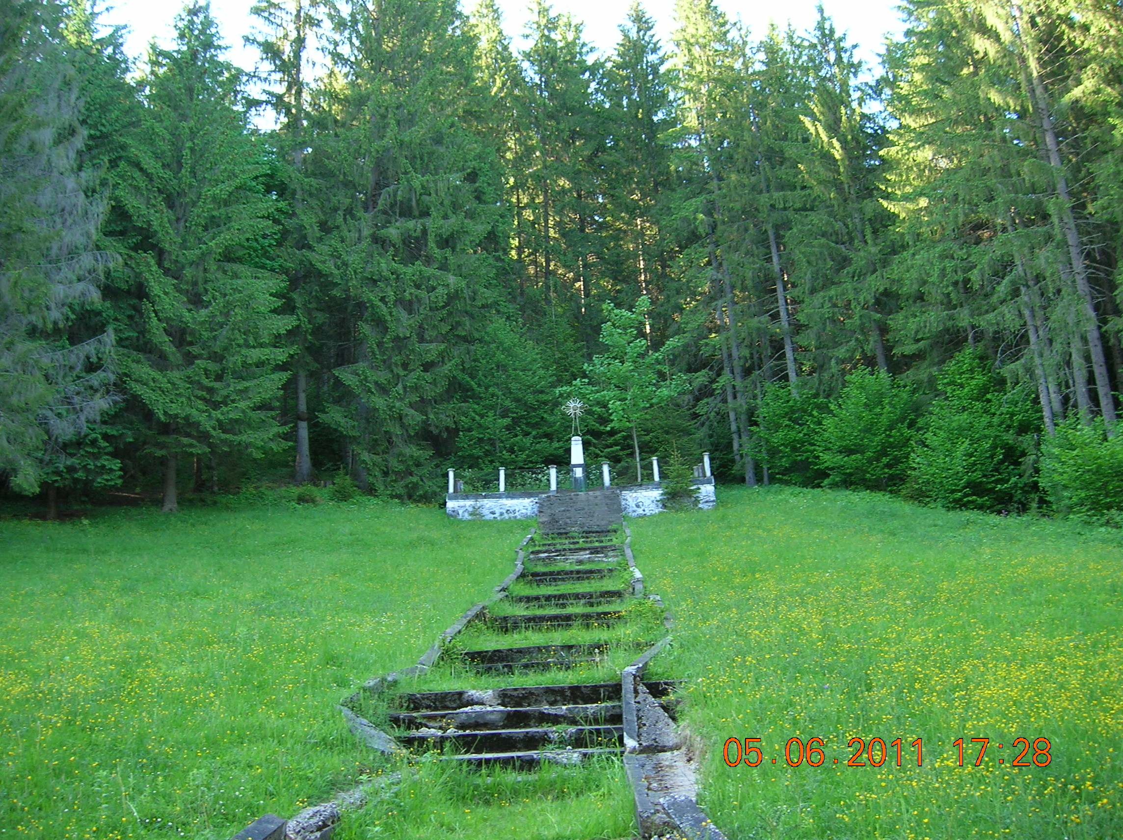 Munţii Stânişoarei (Carpaţii Orientali, România) - Crucea de piatră ridicată în 1964 care marchează poiana de la poalele estice ale muntelui pe care suie Dumul Talienilor, în care odihnesc laolaltă în pământ sute de militari morți în luptele de după Lovitura de stat de la 23 august 1944. În 2013 a fost reconfigurată şi ansamblul a fost refăcut.